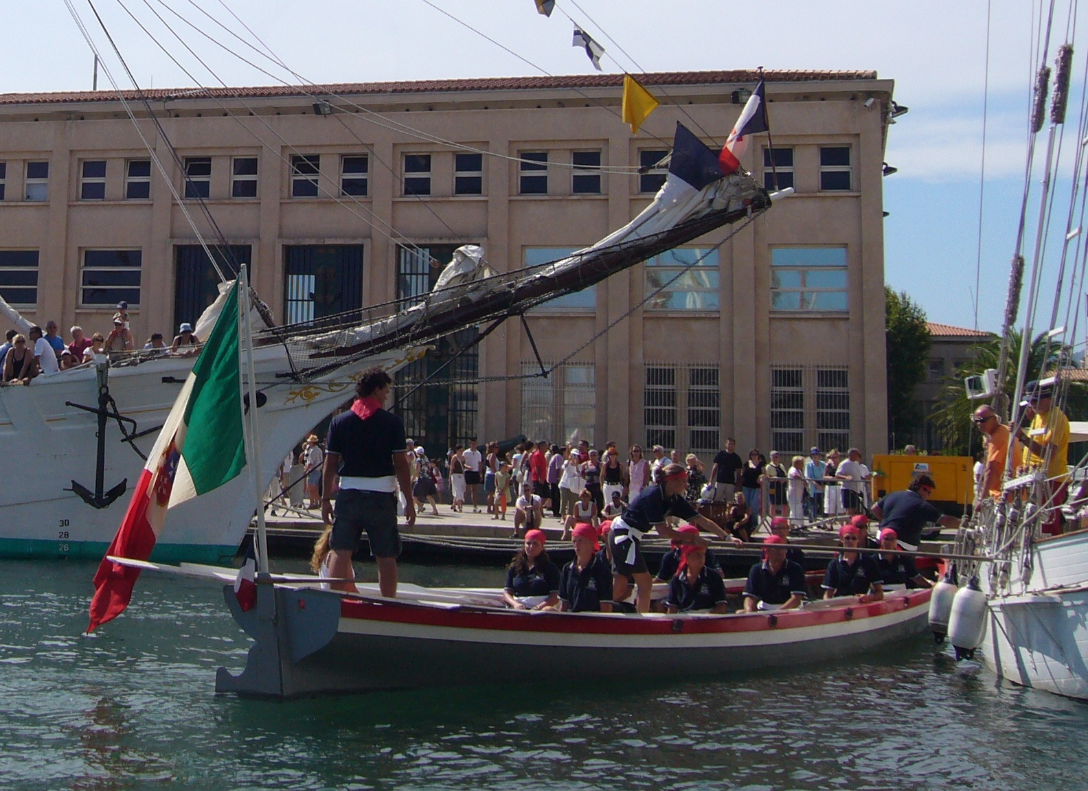 La yole de Bantry Creuza de Mä (Gènes, Italie) durant l'épreuve de la "fille du capitaine", Toulon, juillet 2007